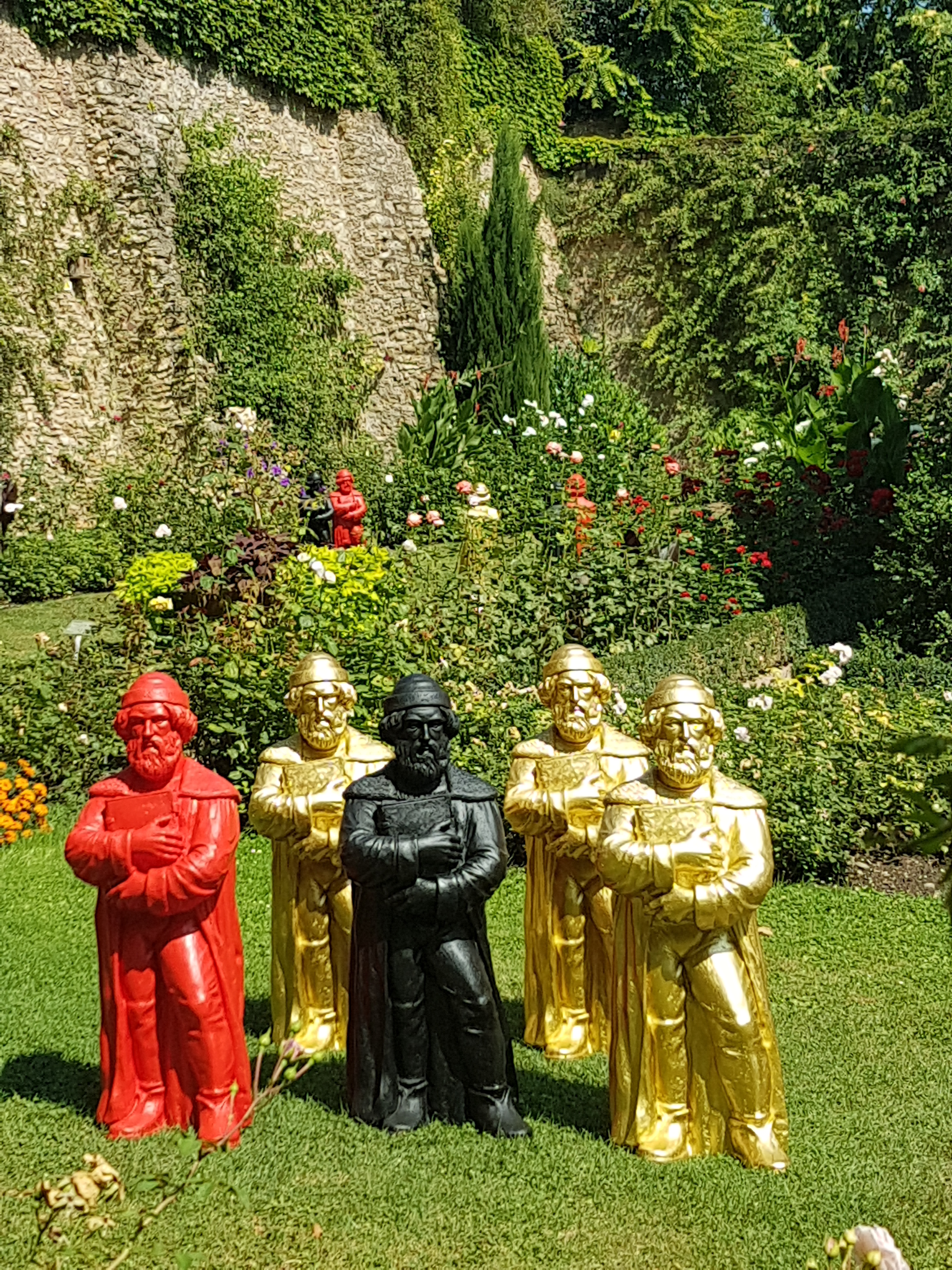 Temporäre Skulpturen-Installation des Konzeptkünstlers Ottmar Hörl im Gutenberg-Gedenkjahr 2018 in der Burg Eltville